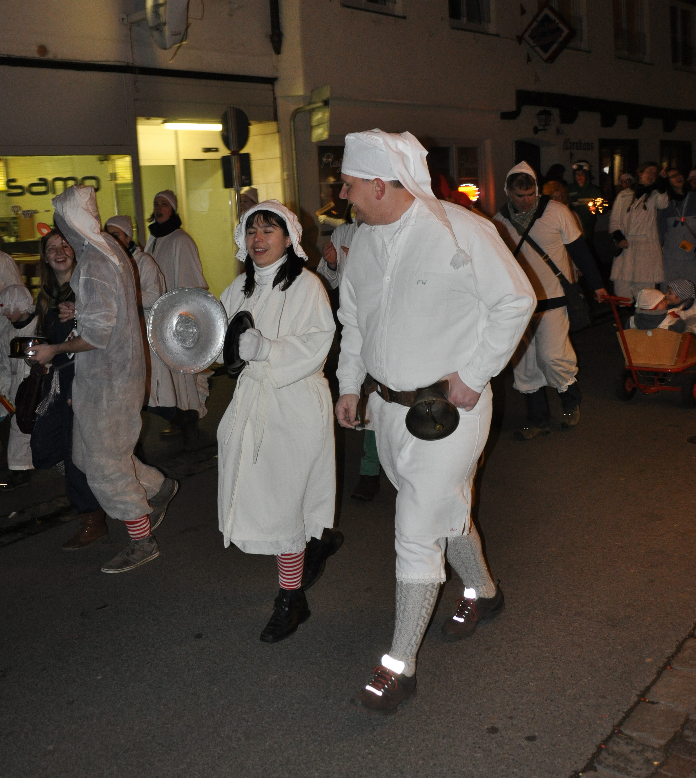 Weingarten (Württemberg), Fasnet 2014, Hemdglonkerumzug am Gumpigen Donnerstag